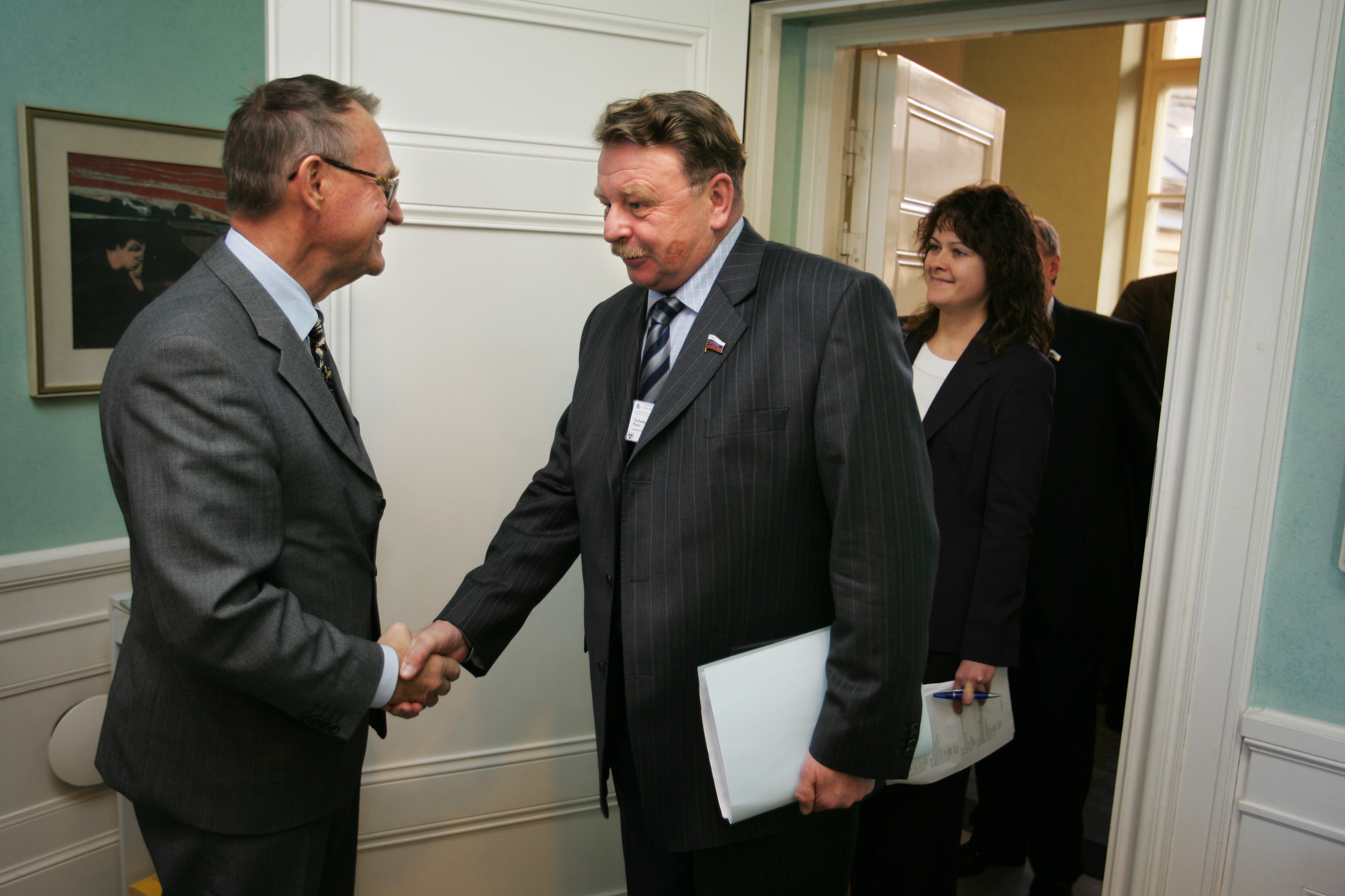 Gabriel Romanus, Nordiska rådets president, hälsar på Vjacheslav Popov, federationsrådet Ryssland.